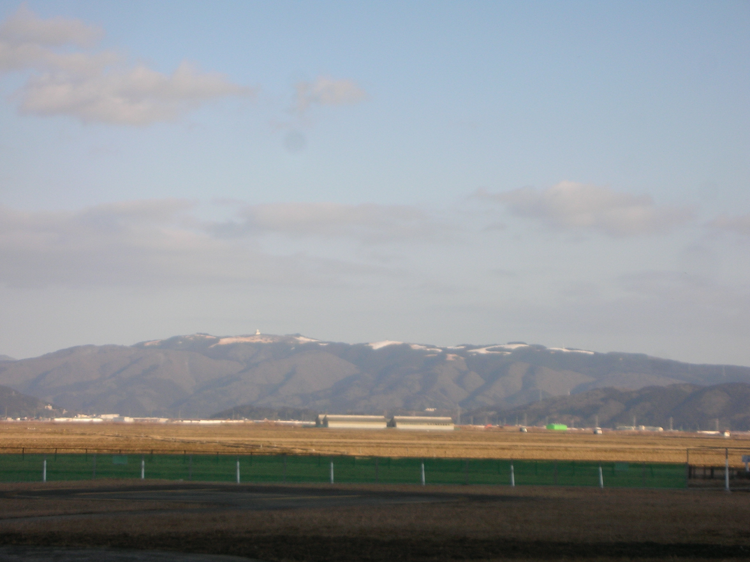 桃生町の水田地帯から観た上品山